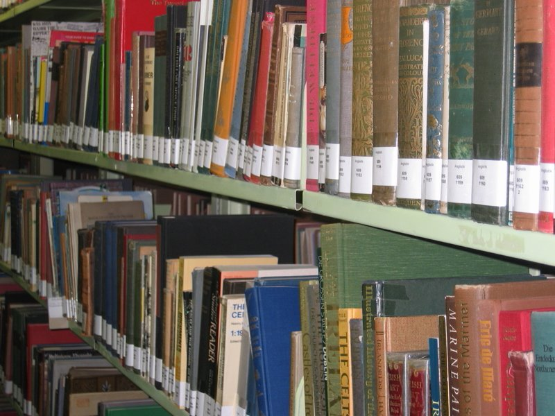 Scaffale colmo di libri all'interno della biblioteca universitaria della facoltà di Lettere di Innsbruck